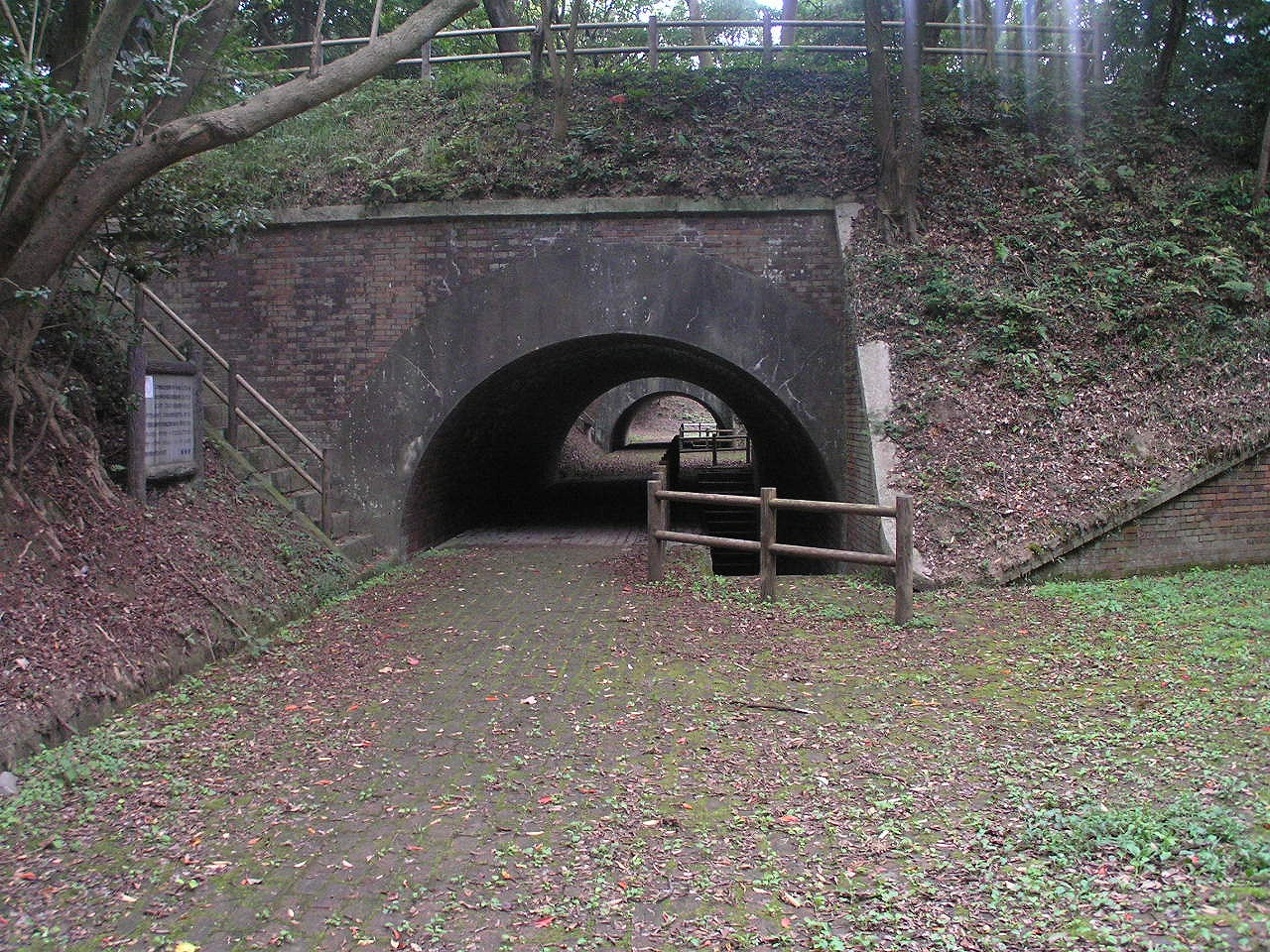 由良要塞（ゆらようさい）大日本帝国陸軍加太砲台由良要塞